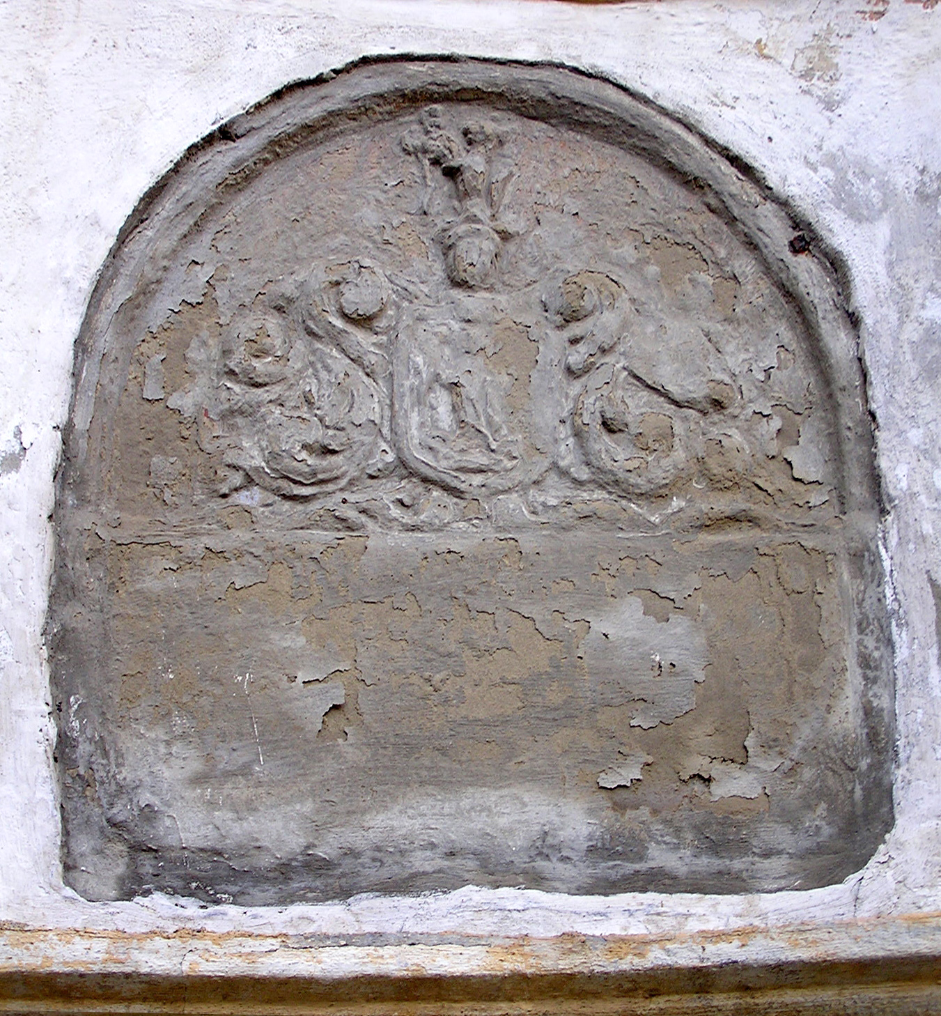 Kaštieľ v Bytčici, barokový, pravdepodobne postavený okolo 1725. Erb rodu Révai na zadnej fasáde do parku.